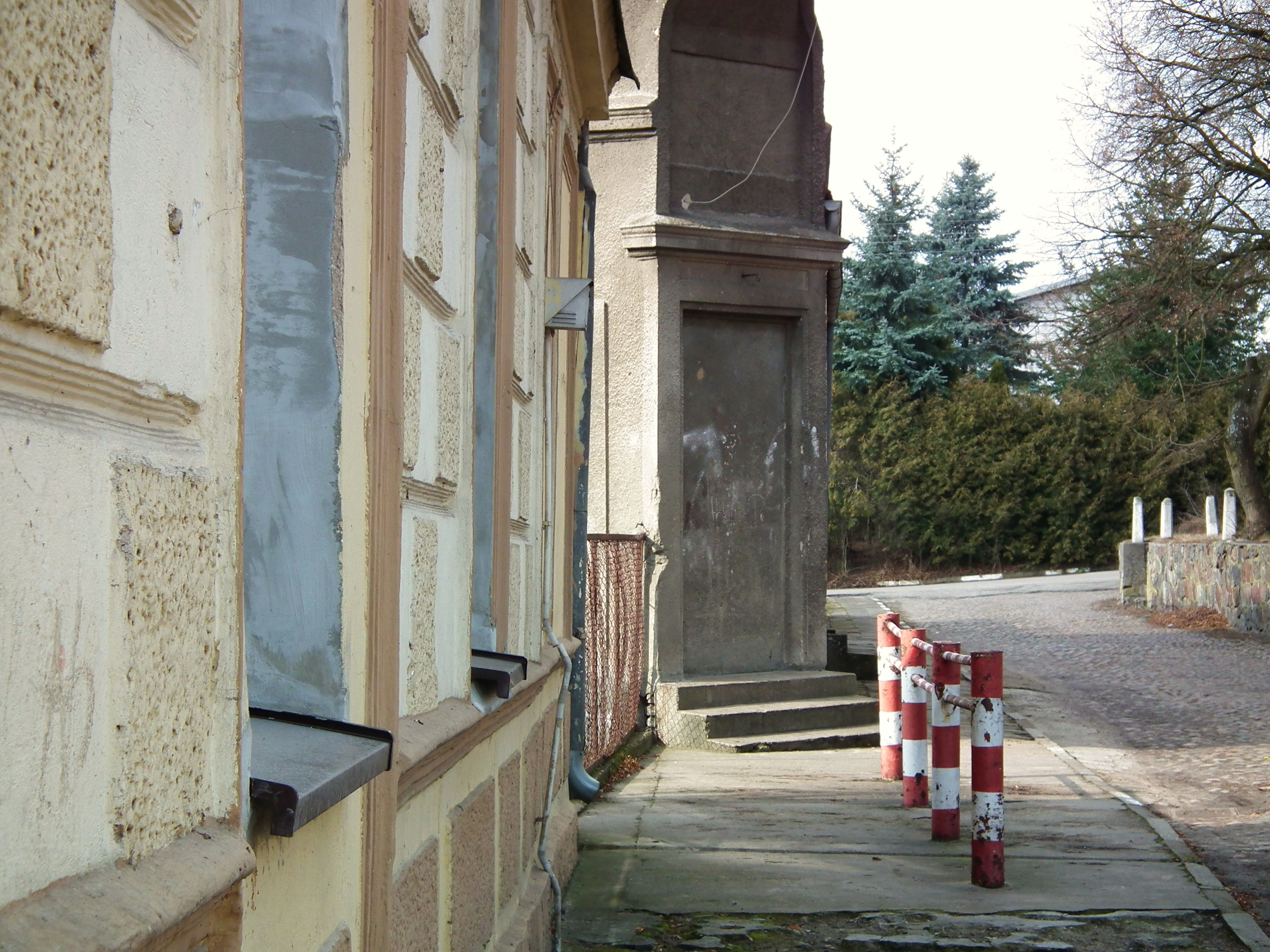 Krajobraz miejski z Lędyczka.